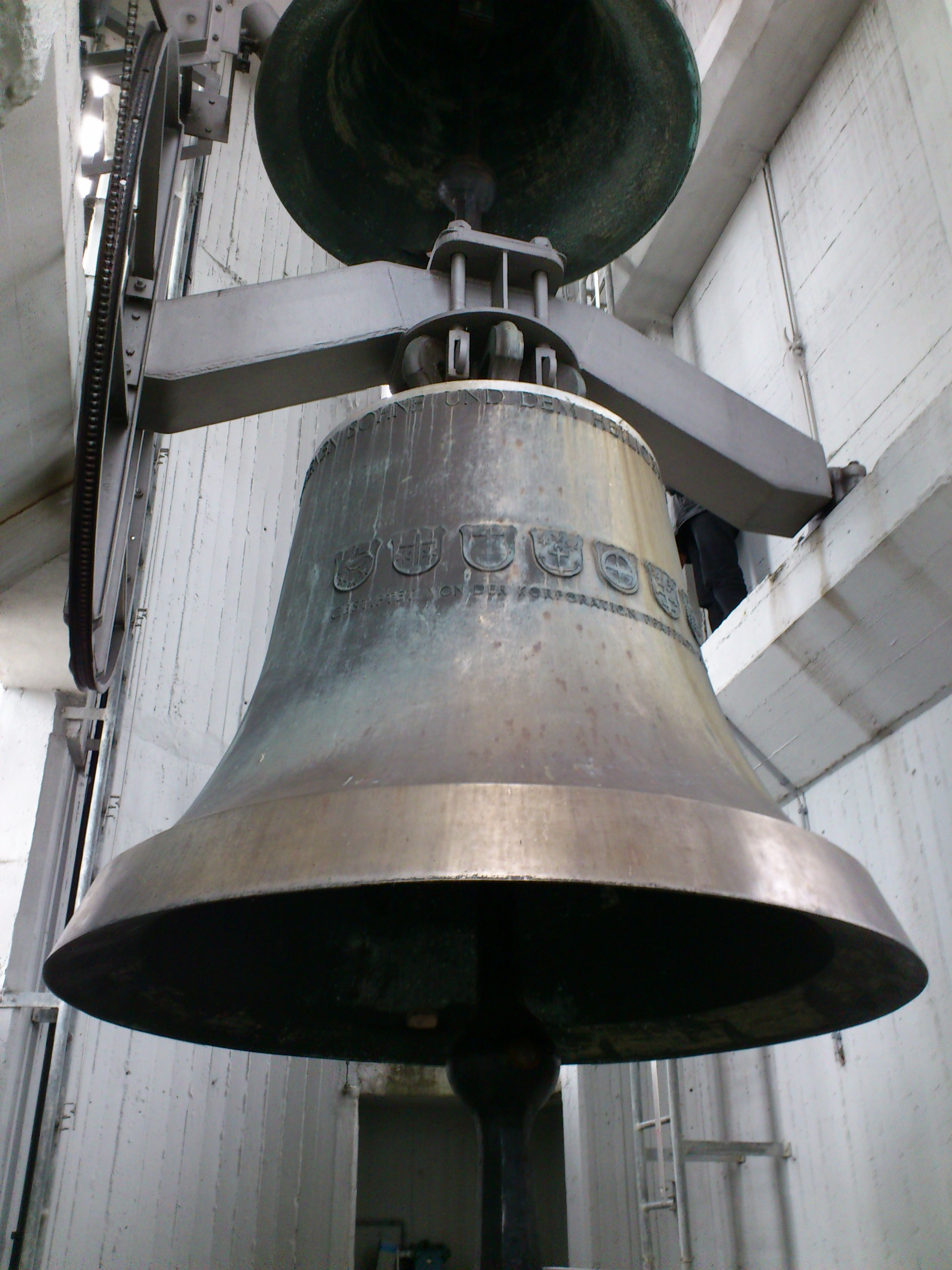 Grosse Glocke im Turm der Pfarrkirche St. Meinrad zu Pfäffikon SZ. Ton: ges° Gewicht: 7000 kg Giesser, Ort: H. Rüetschi AG, Aarau Jahr: 1965